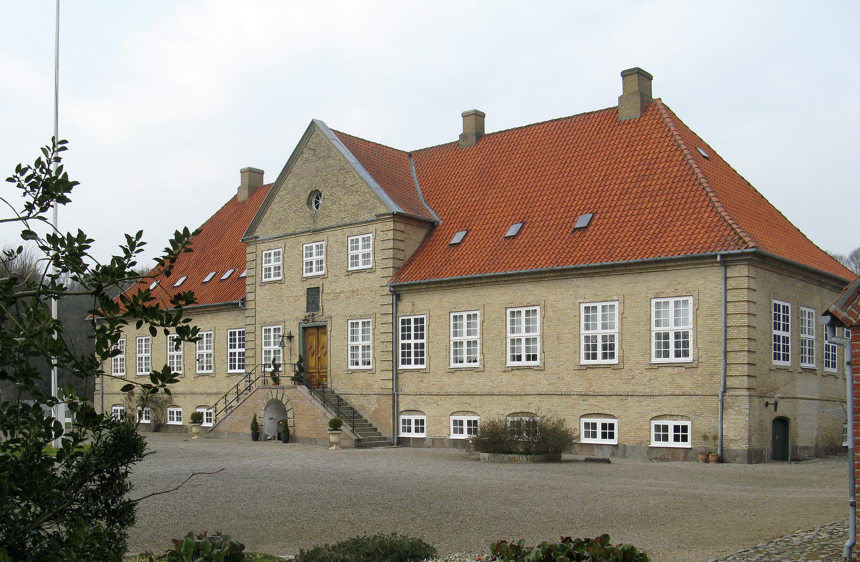 Favrskov hovedgård, Favrskov Kommune.